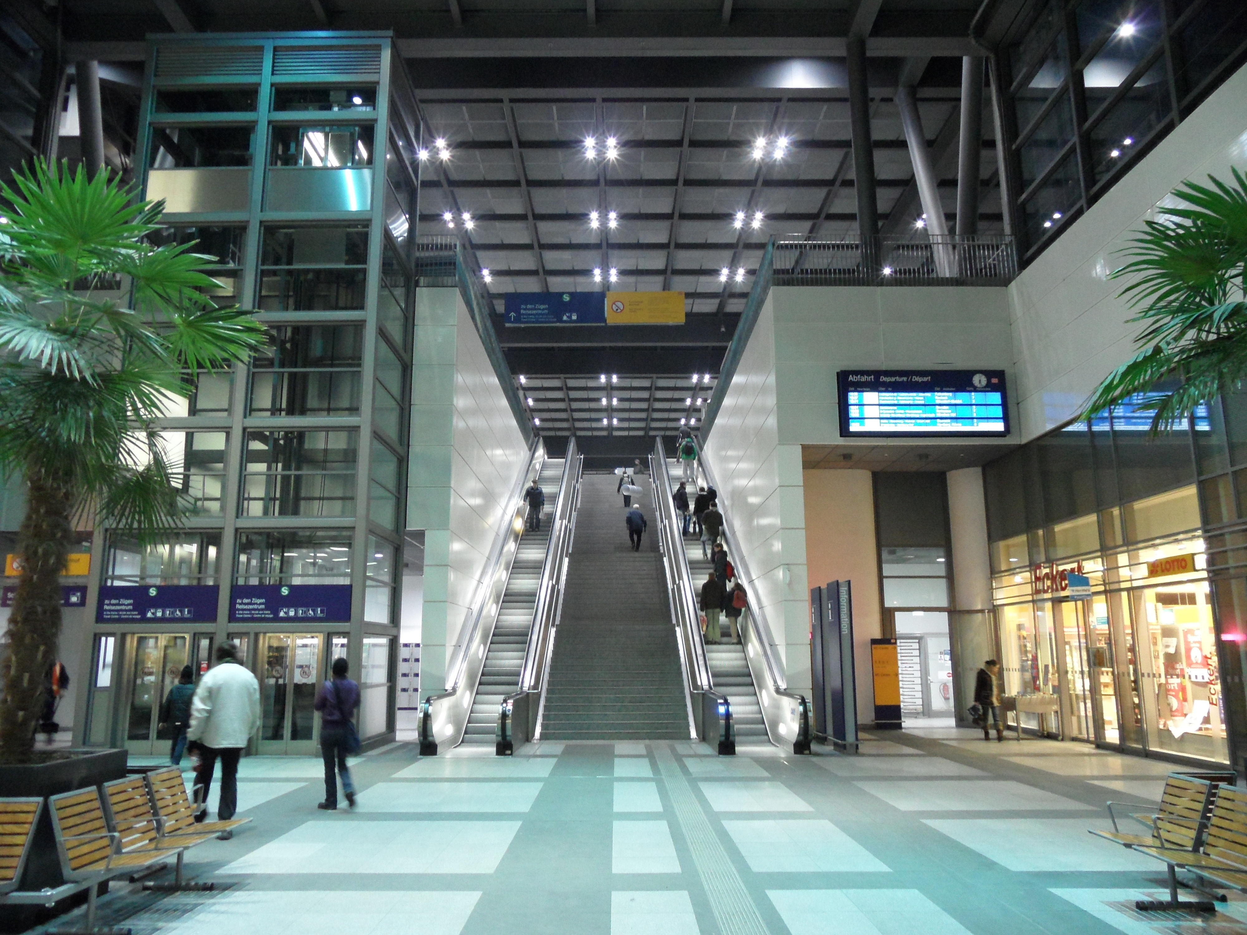 Berlin - Bahnhof Südkreuz - Osthalle